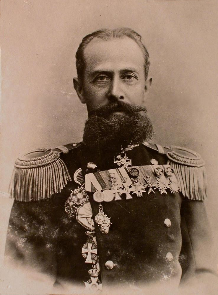 Яковлев, Николай Матвеевич